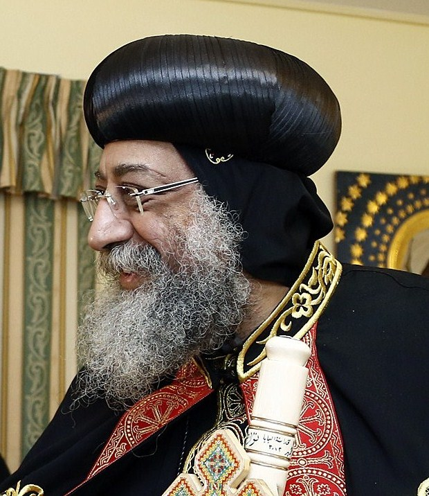 Pope Tawadros II.